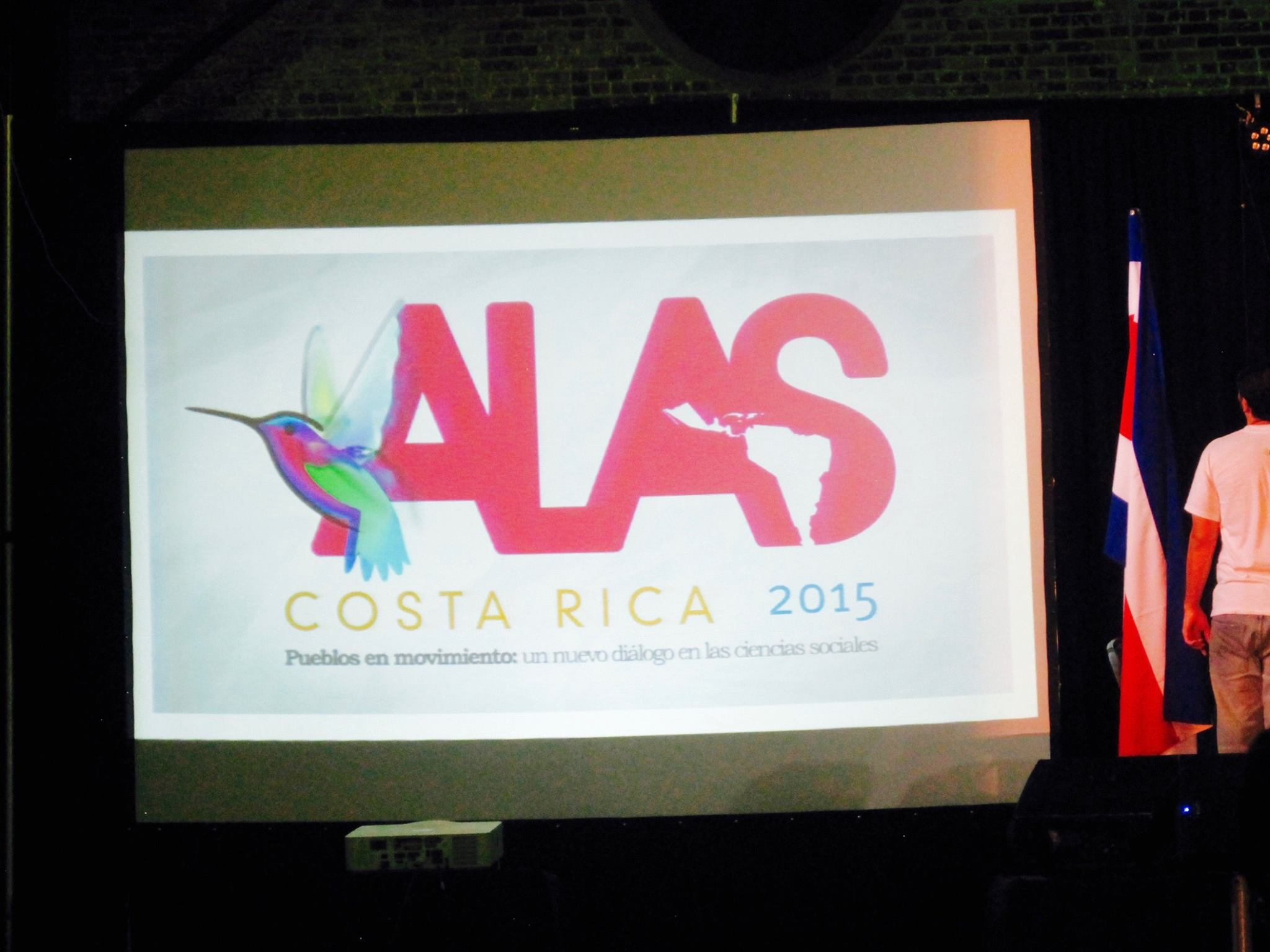 Proyección en el Congreso de la Asociación Latinoamericana de Sociología 2015